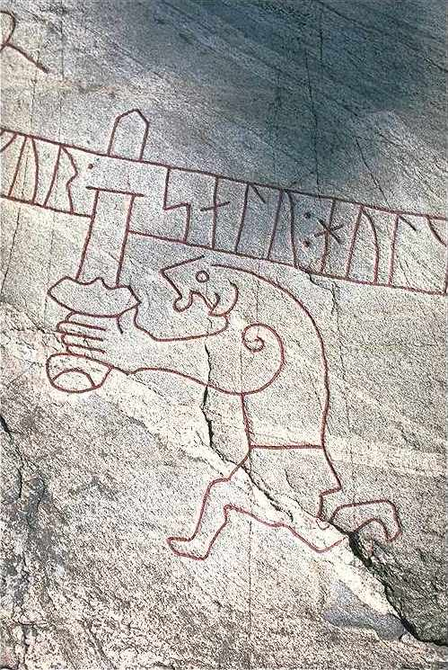 Detalj av Ramsundsristningen: Sigurd dräper draken Fafner. Motiv: Sö101 Jäder, Ramsundsdsristningen Nyckelord: Riksintressen, Runor Kategori: Hällristning, Runristning/runsten Detalj av Ramsundsristningen: Sigurd dräper draken Fafner. Sö101 Jäder, Ramsundsdsristningen.